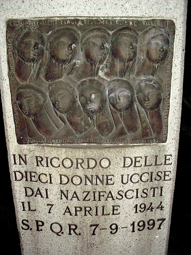 La lapide posta a memoria dell'eccidio